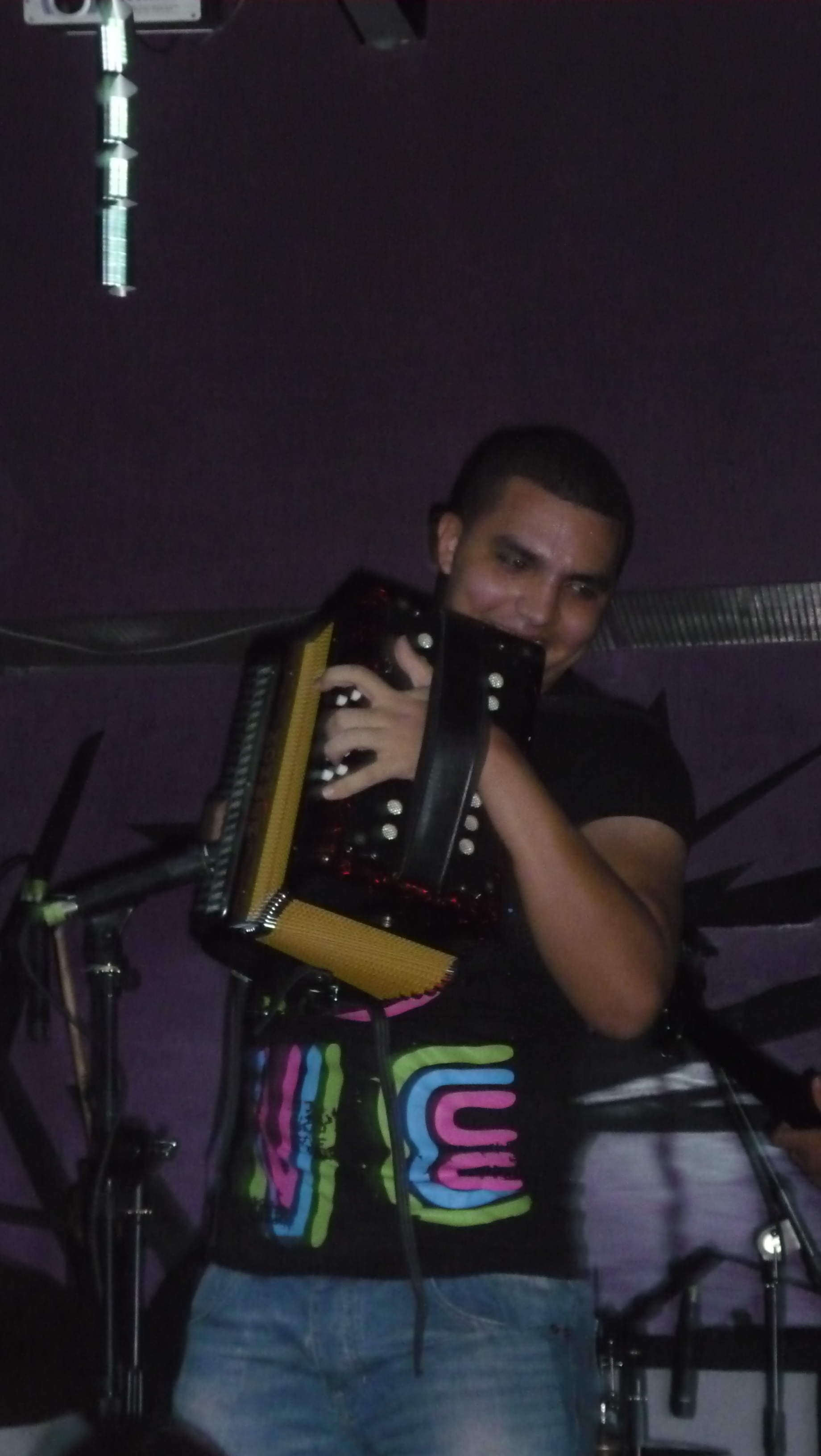 Krlos Villa acordeonista y actor colombiano